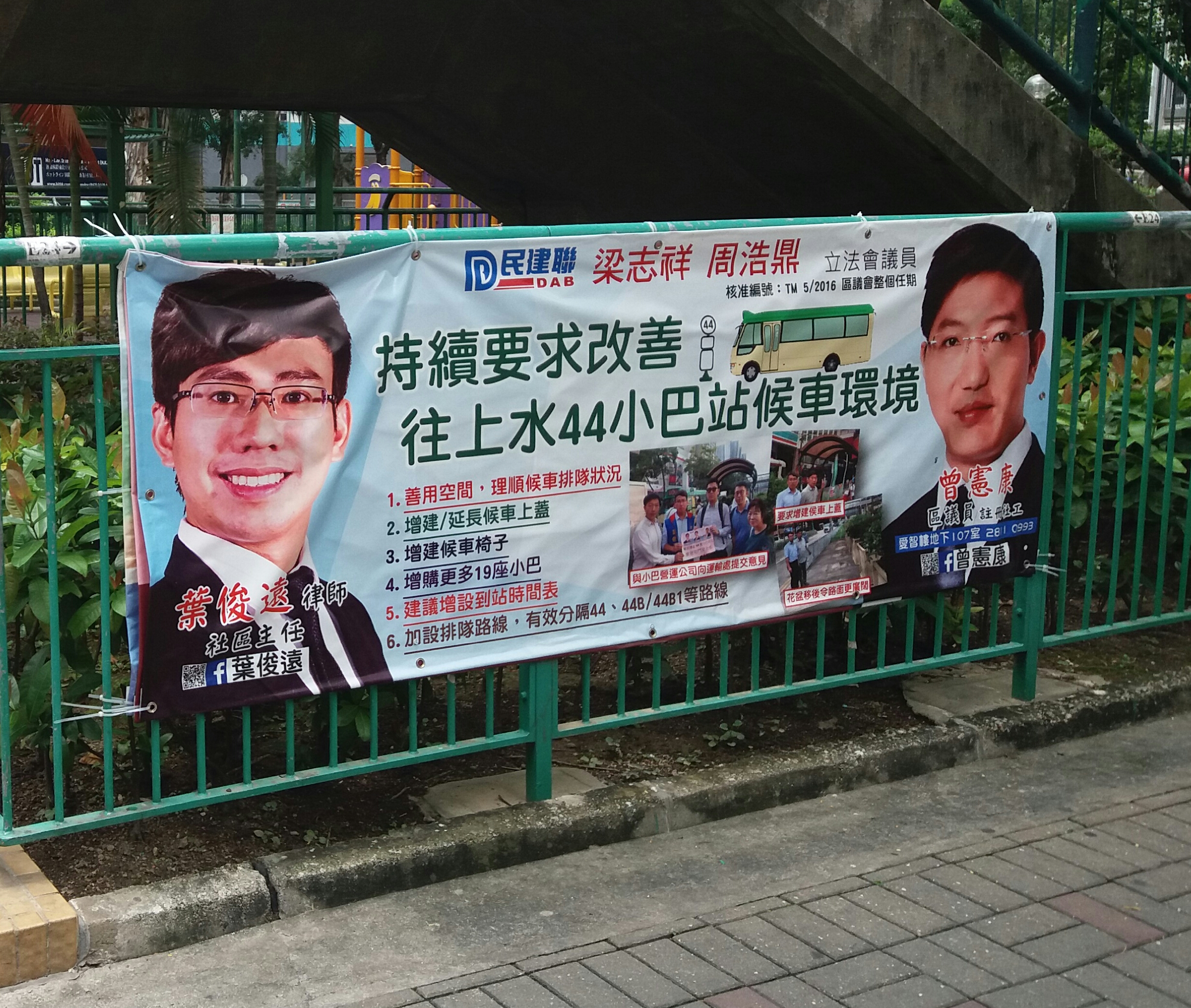 中文（香港）: 有區議員掛上橫額，要求改善新界區專線小巴44線的服務質素